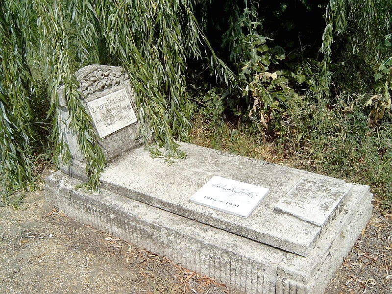 Z. Molnár László (Zombor, 1885. június 23. – Budapest, 1956. november 17.) drámai színész és Báthory Giza (Budapest, 1884 – Budapest, 1941. április 16.) drámai színésznő sírja Budapesten. Kerepesi temető: 17/3-2-2.